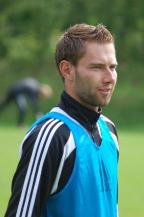 Michael Holt beim Trainingsauftakt 2009